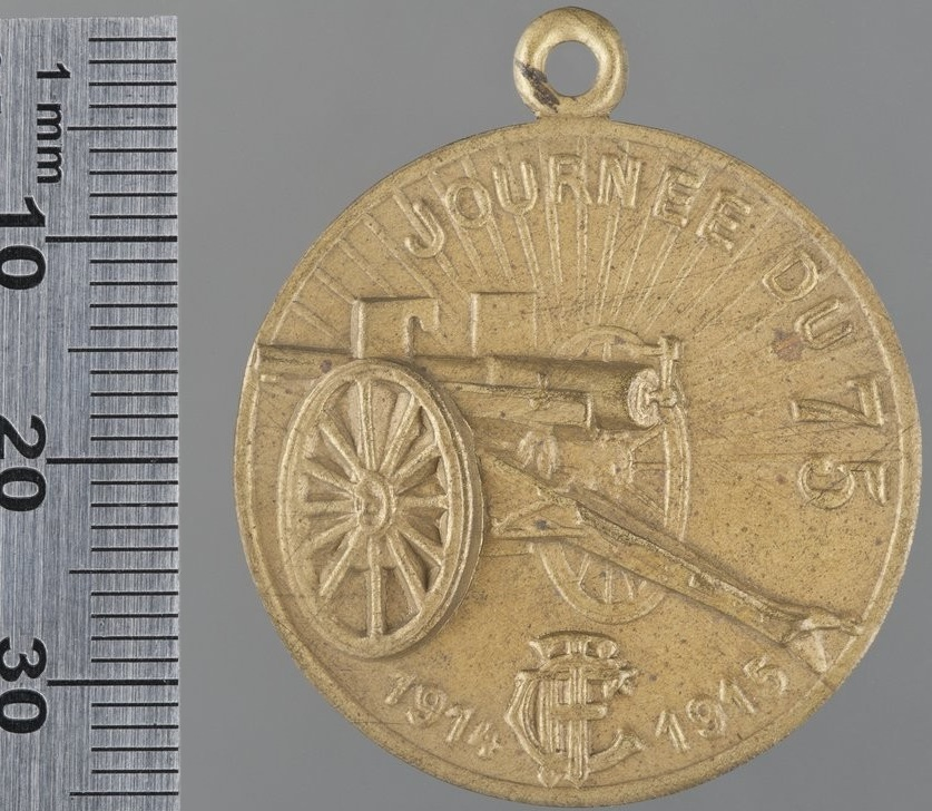 Médaille commémorative en cuivre de la « Journée du 75 » : un canon de 75 mm vu de trois quarts arrière gauche, le monogramme TCF (Touring Club de France) entre les deux dates.